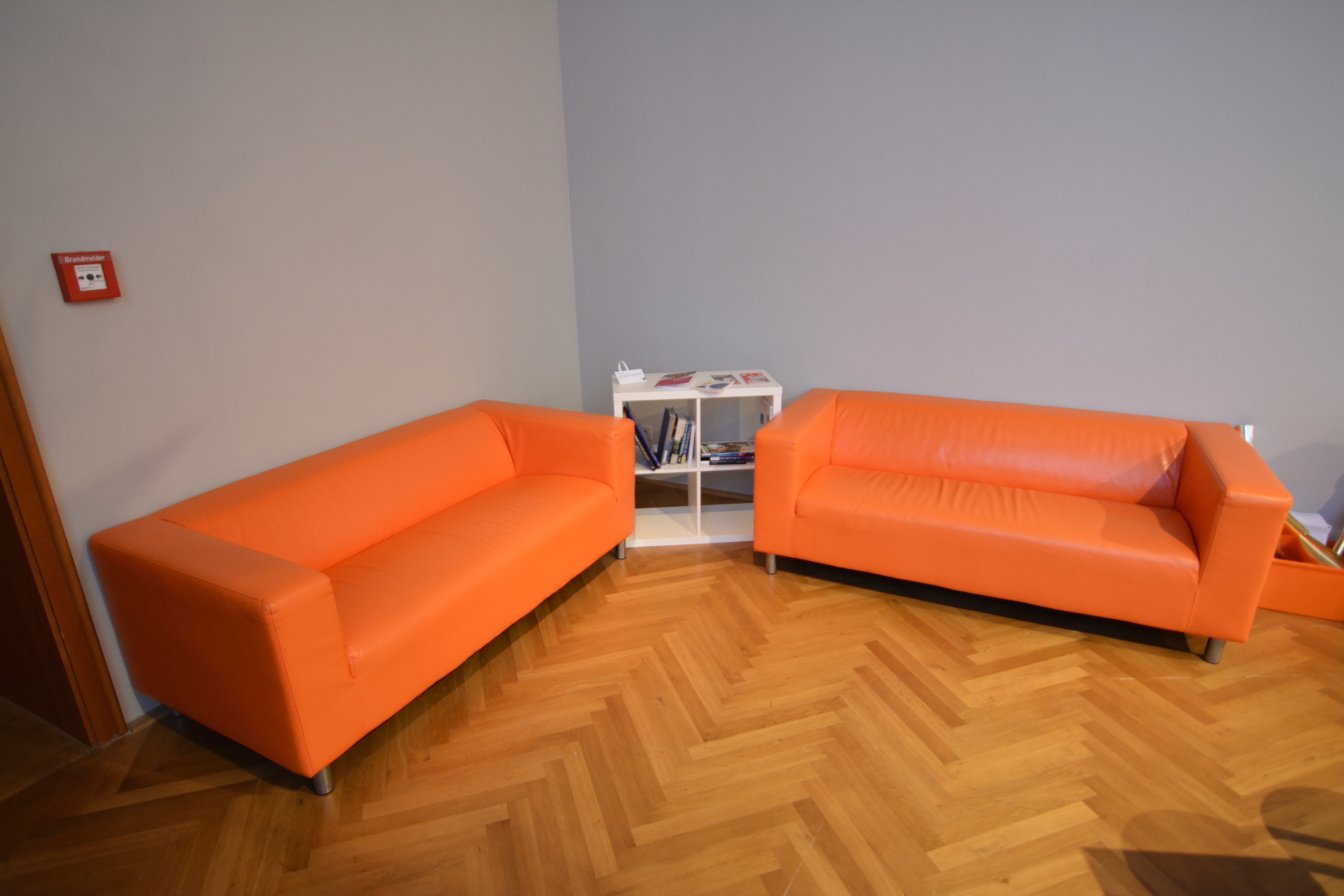 Impressionen aus dem Museum Europäischer Kulturen in Berlin.Hier: Ruhezonen im Museum